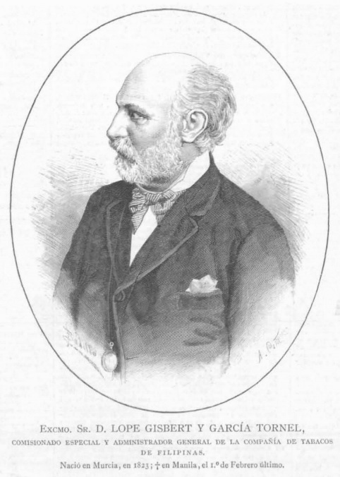 Lope Gisbert y García Tornel.